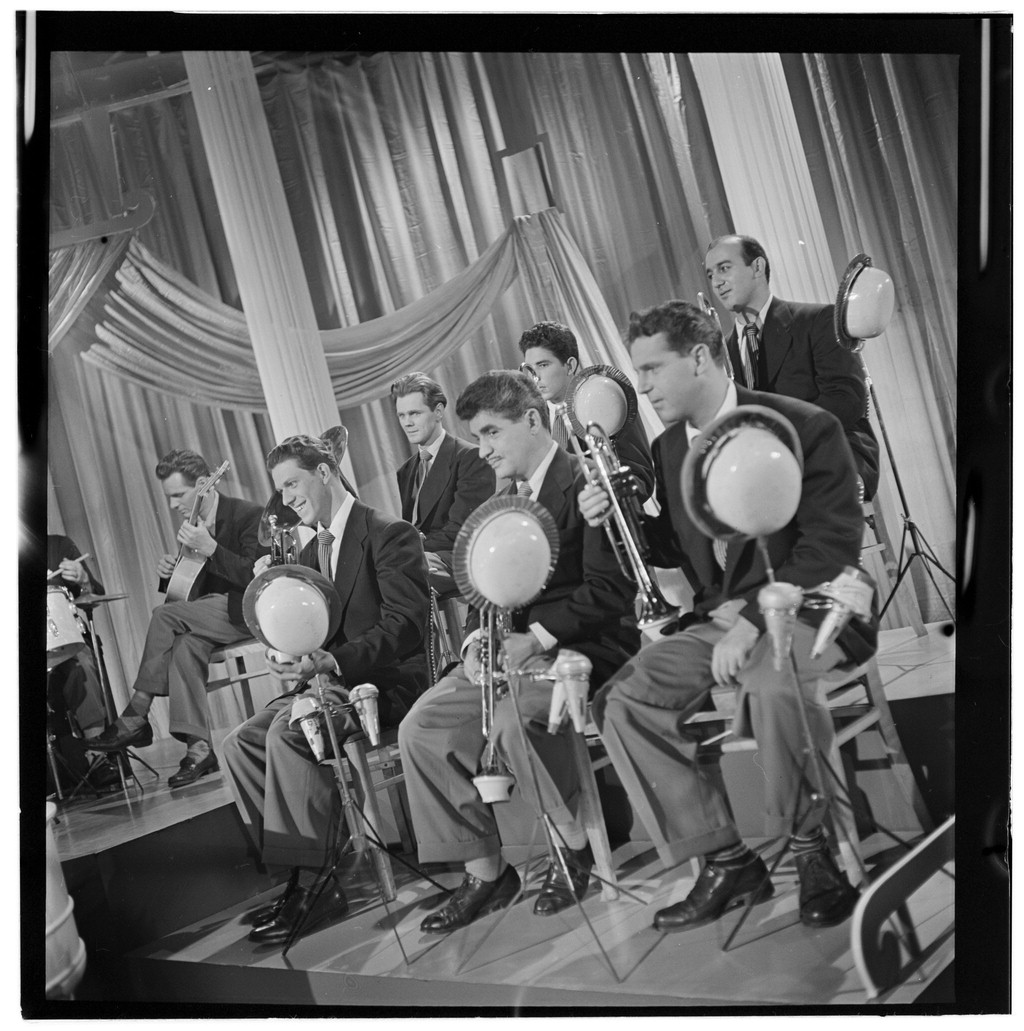 (Erste Reihe, von links: Emil Terry, Lou Mucci, Eddie Zandy, (Zweite eihe, von links:) Barry Galbraith, Bill Barber, Al Langstaff und Vahe Takvorian, Columbia Pictures Studio, New York.